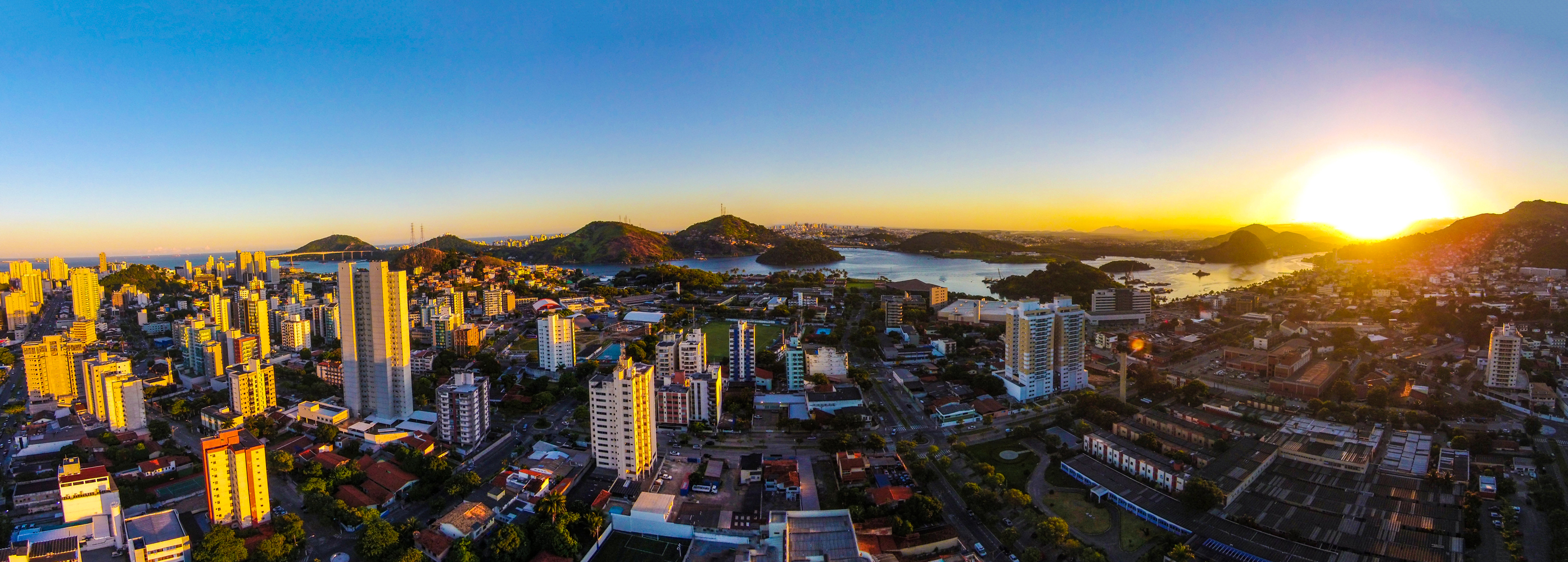 Pôr do sol na cidade de Vitória, Espírito Santo